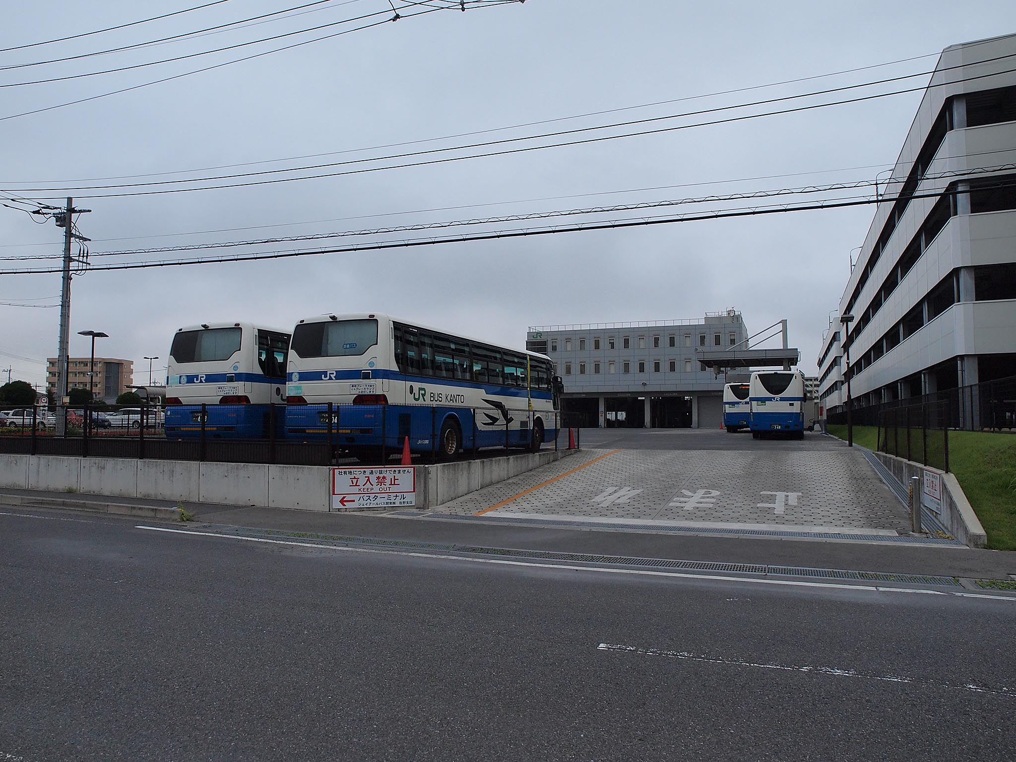 2009年に開設されたJRバス関東佐野支店。佐野新都市バスターミナルに隣接する。